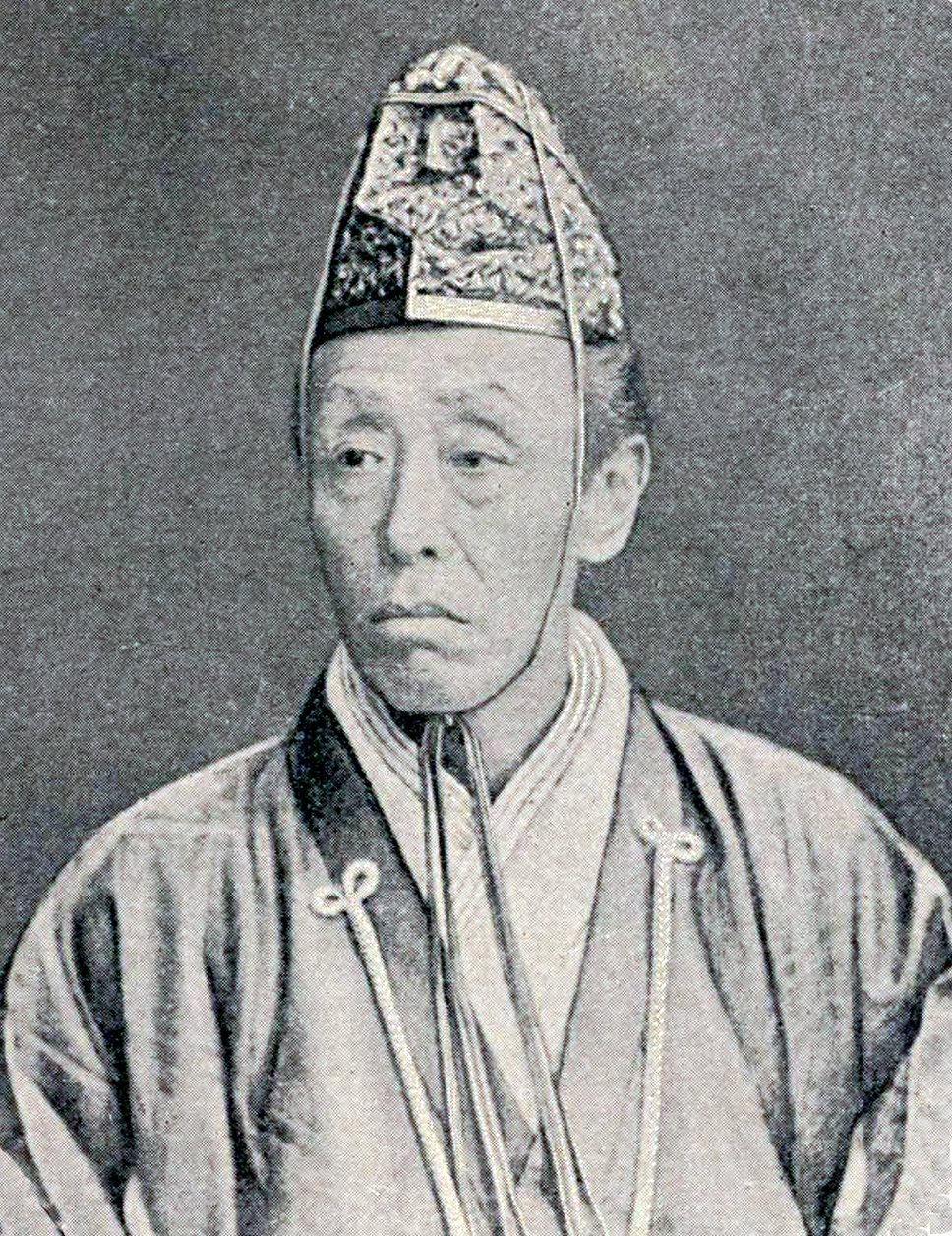 「幕末名家寫眞集1」 板倉周防守